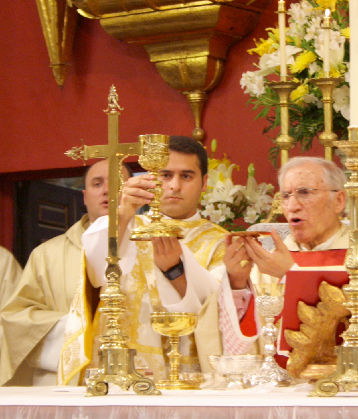 Misa Adrián Sosa y Cardenal Rouco Varela